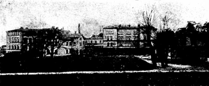 Eugeniahemmet.